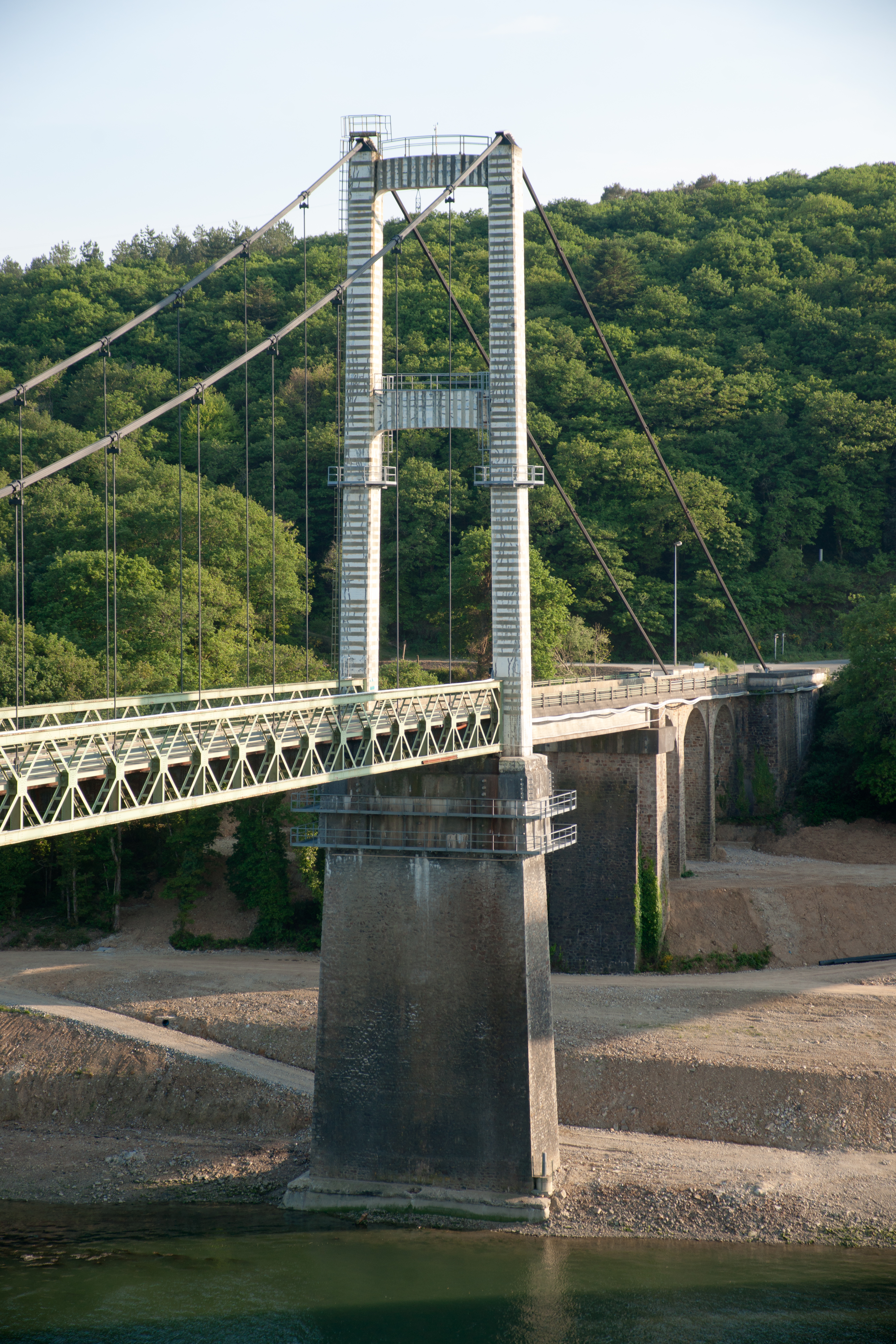 Pont de Térénez (1951) - pile sud